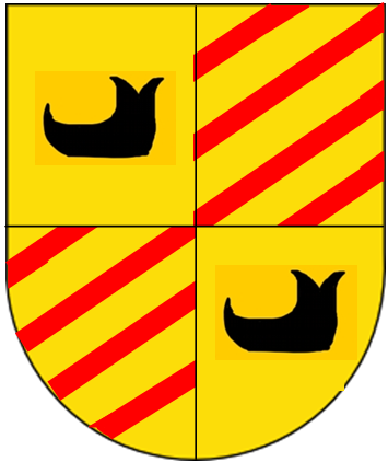 ESCUDO DE ARMAS DE XIMÉN PÉREZ DE ANDILLA